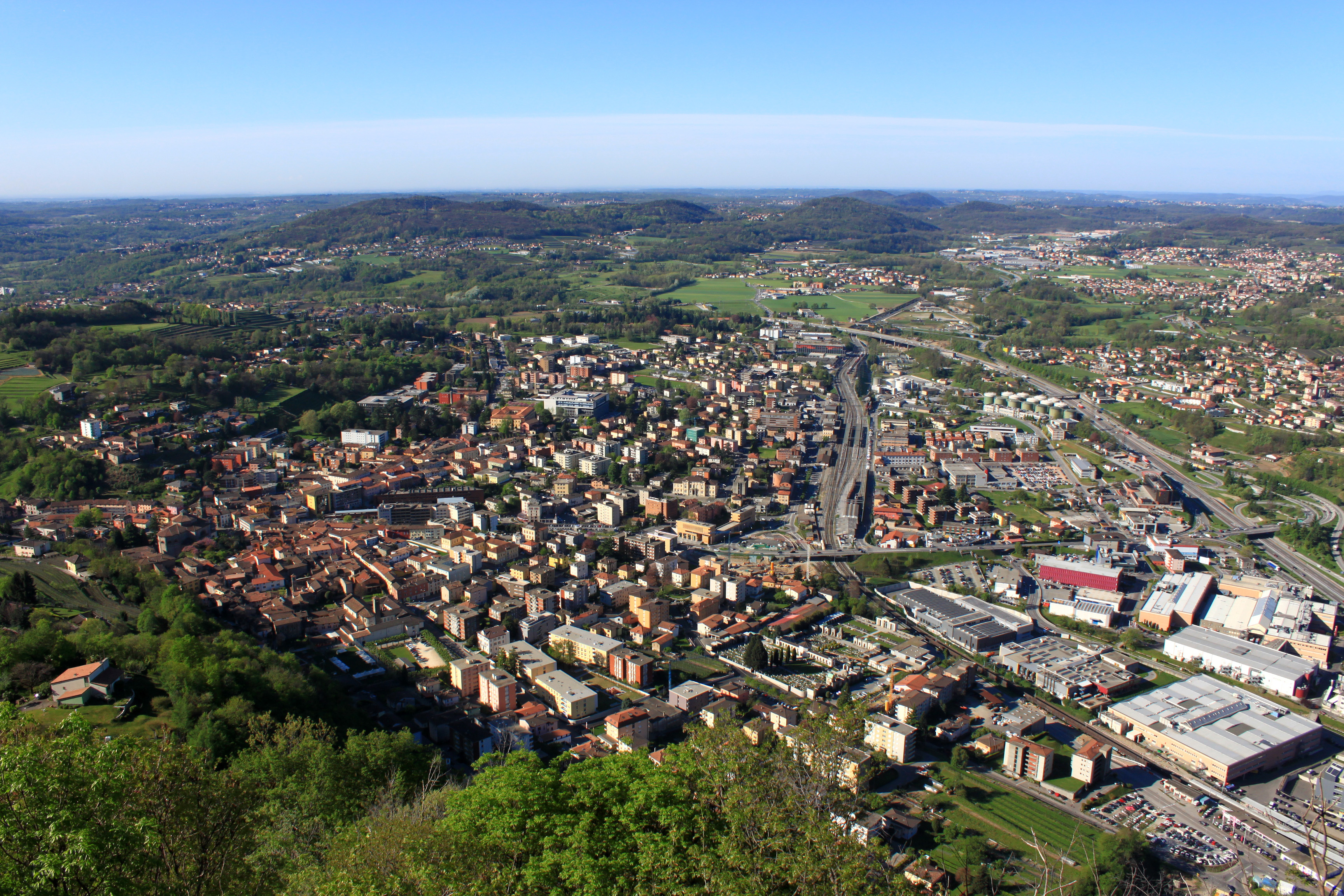 Aussichtspunkt in Somazzo. Von hier hat man einen phantastischen Blick auf Mendrisio und die umliegenden Berge des Südtessin. Bei klarer Luft geht die Aussicht bis ins Italienische Mailand.